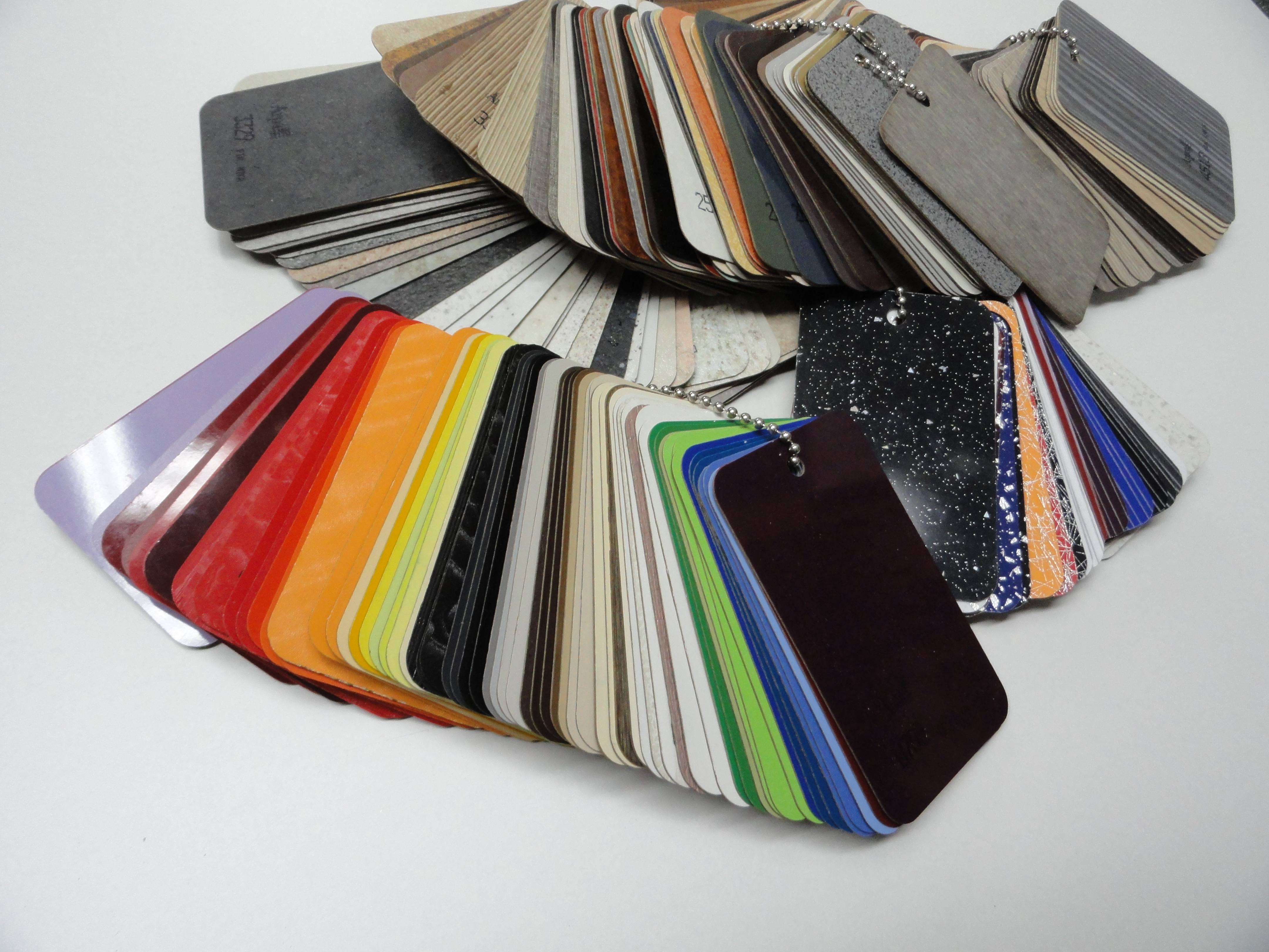 Декоративный бумажно-слоистый пластик ДБСП Decorative HPLaminate